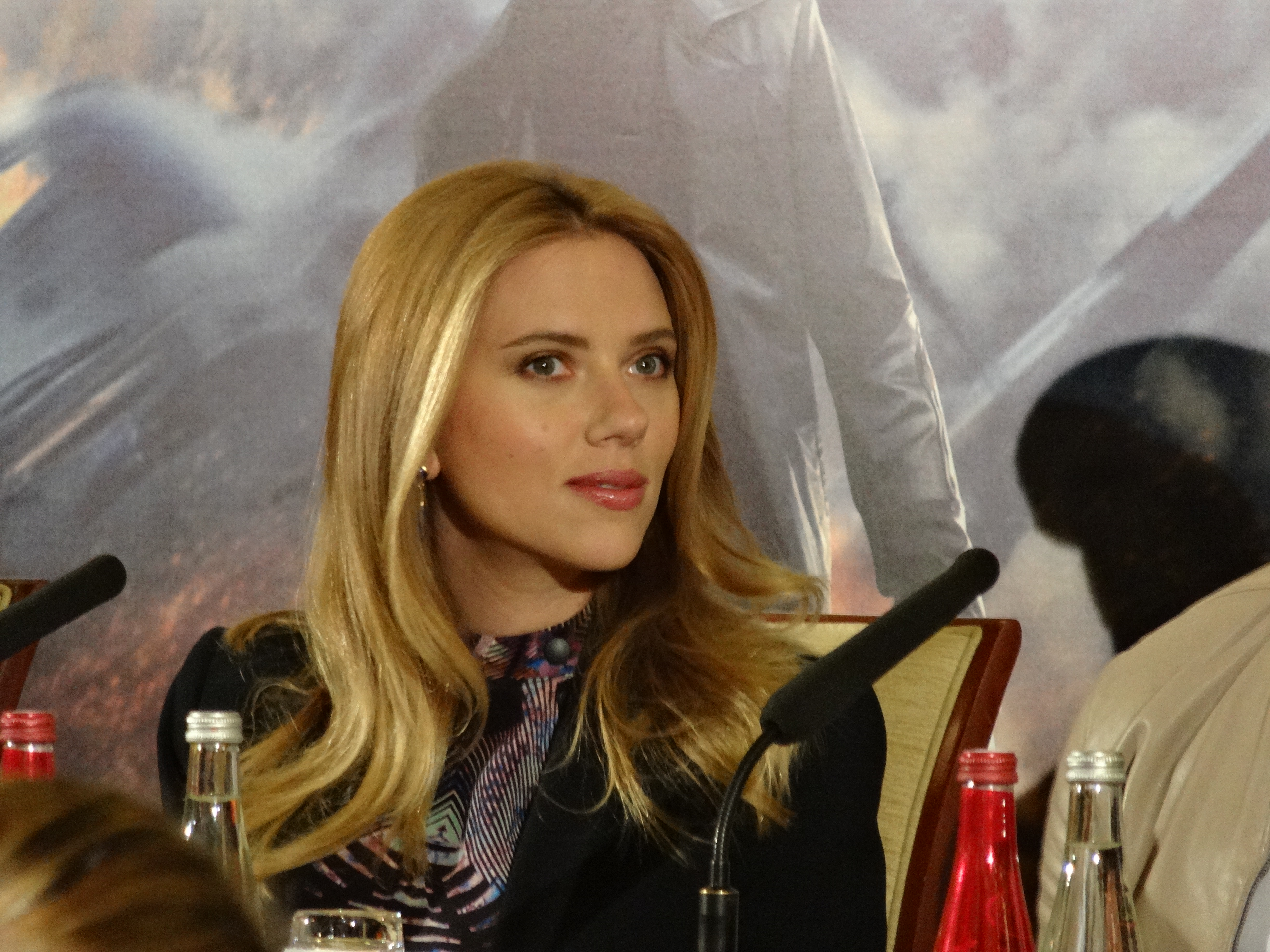 Conférence de Presse Captain America 2